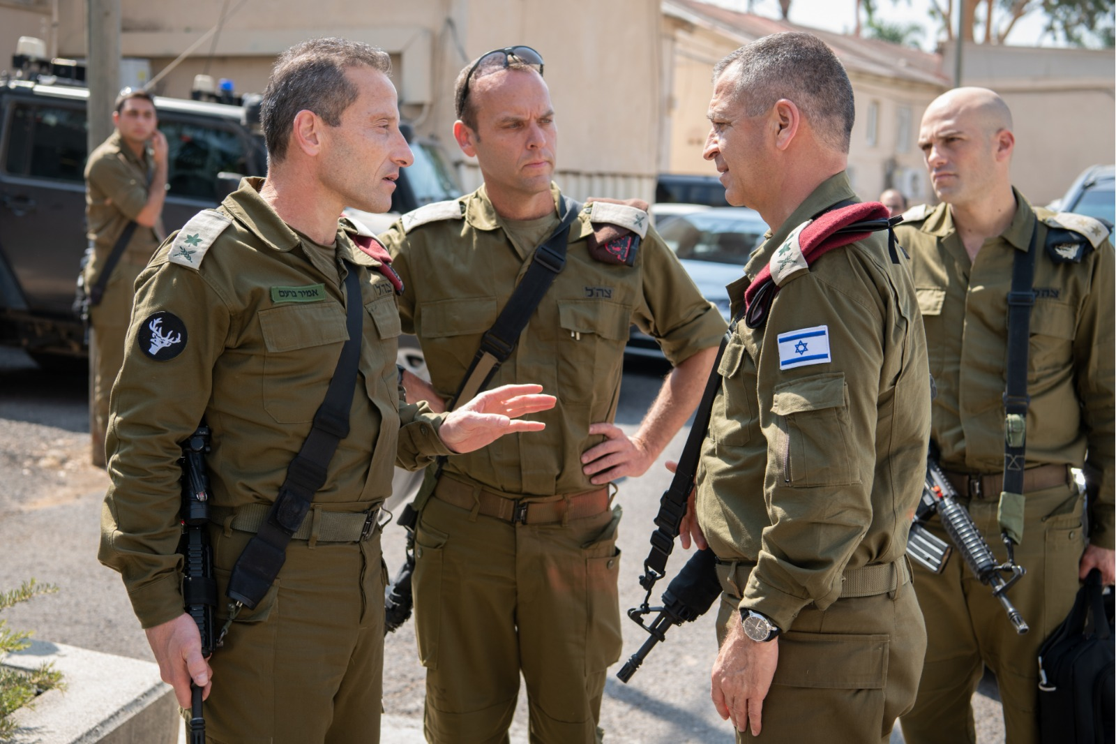 ביקור הרמטכ"ל באוגדה 91, אוגוסט 2019